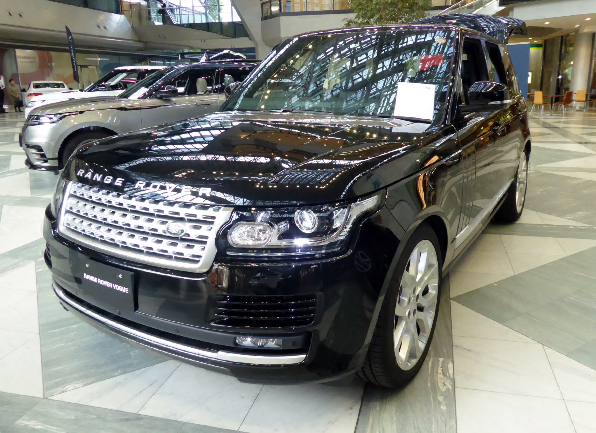 ABA-LG3SB型ランドローバー・レンジローバーVOGUEをフロントから撮影。